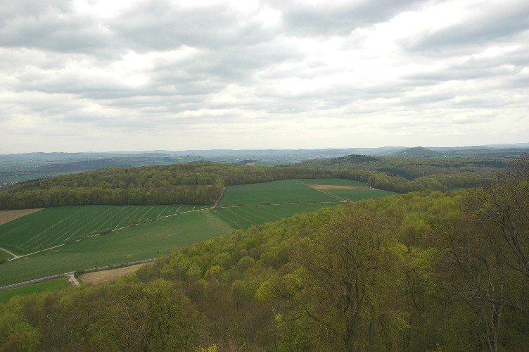 Leinebergland, Germany, North of Göttingen, Blick von der Plesse auf den Hopfenberg/Bielstein (li) und die Hohe Steyer im Nörtener Wald und den Wieter(re)